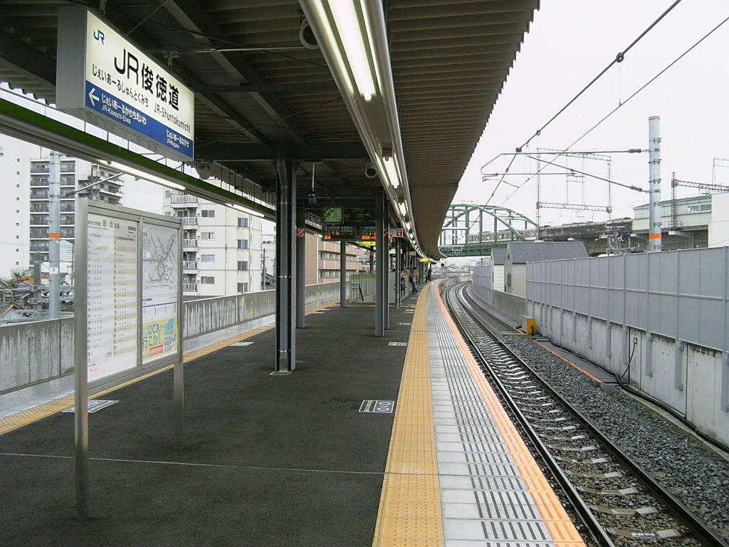 JR俊徳道駅（東大阪市永和）